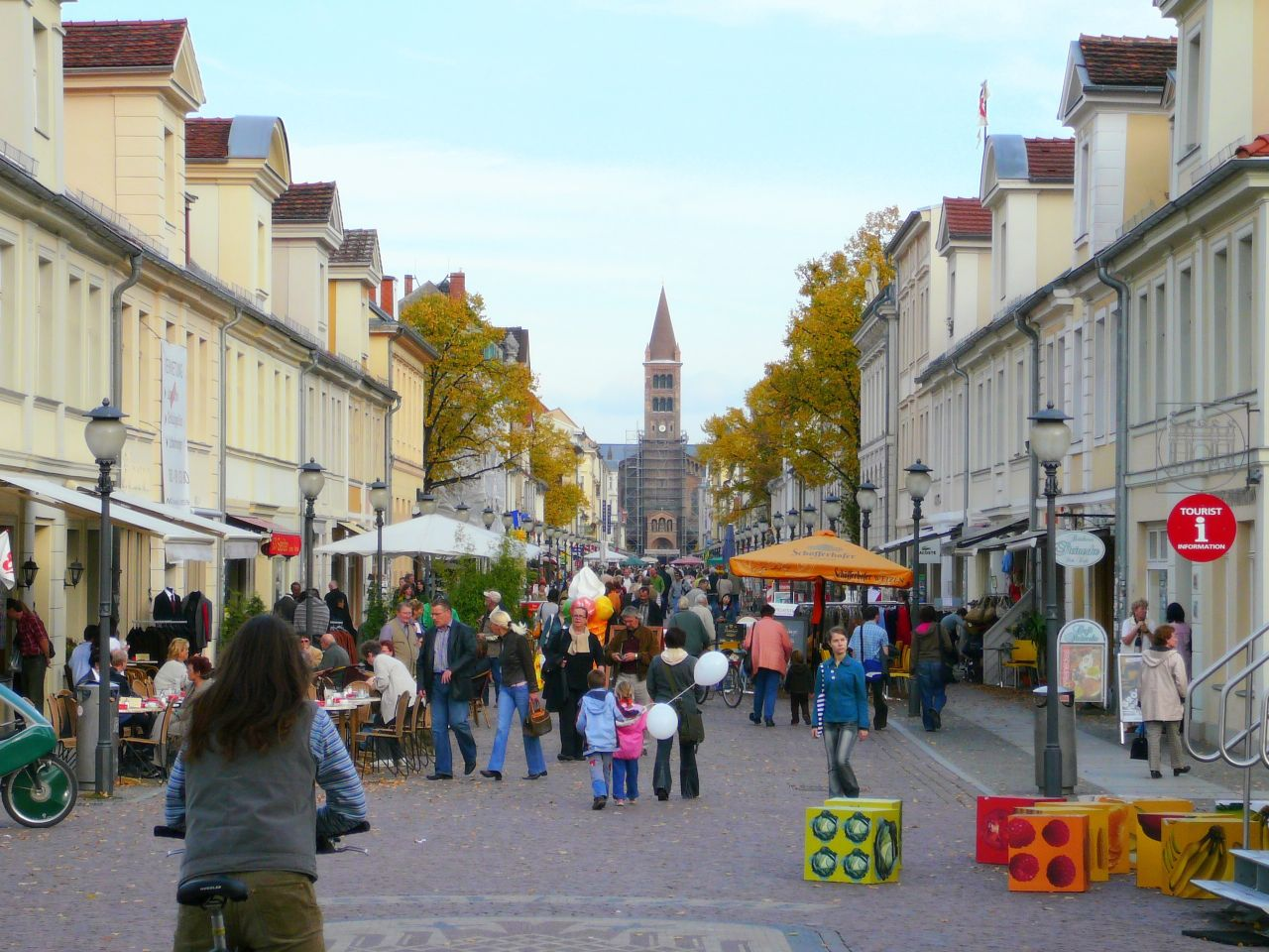 Brandenburger Straße in Potsdam, im Hintergrund die St.-Peter-und-Paul-Kirche